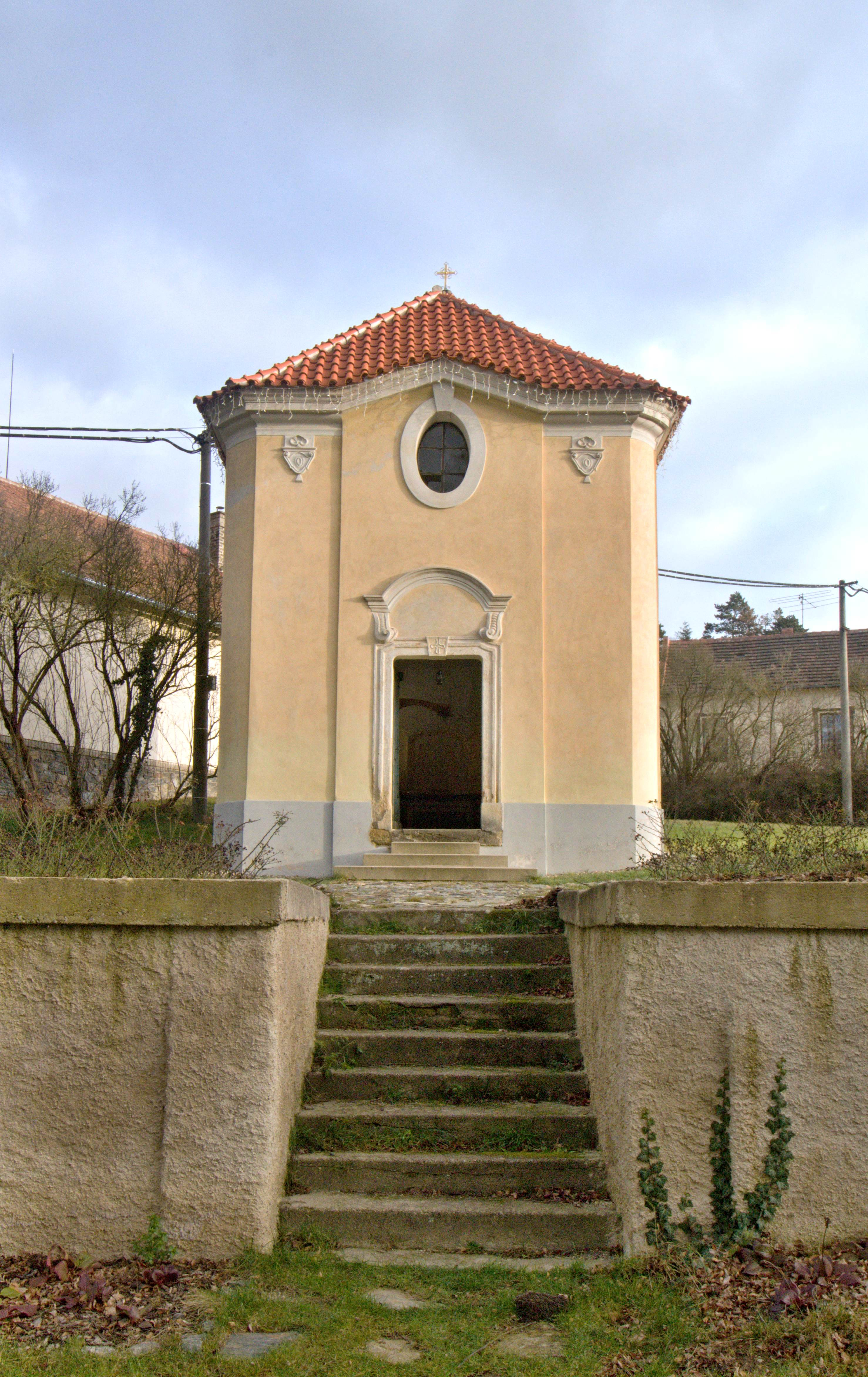 Kováry, okres Kladno, kaple sv. Isidora